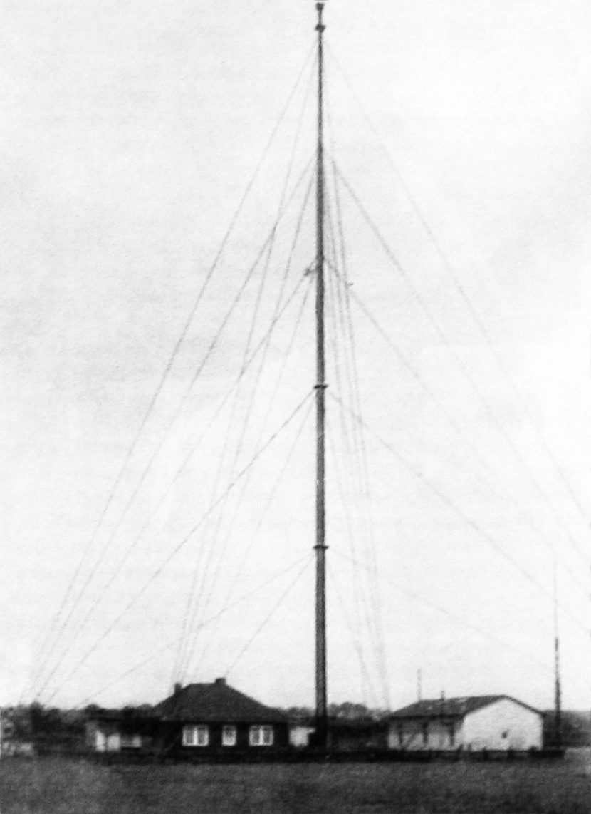 Versuchsfunkstelle Eberswalde, Foto auf einer permanent am Finowkanal angebrachten Schautafel)